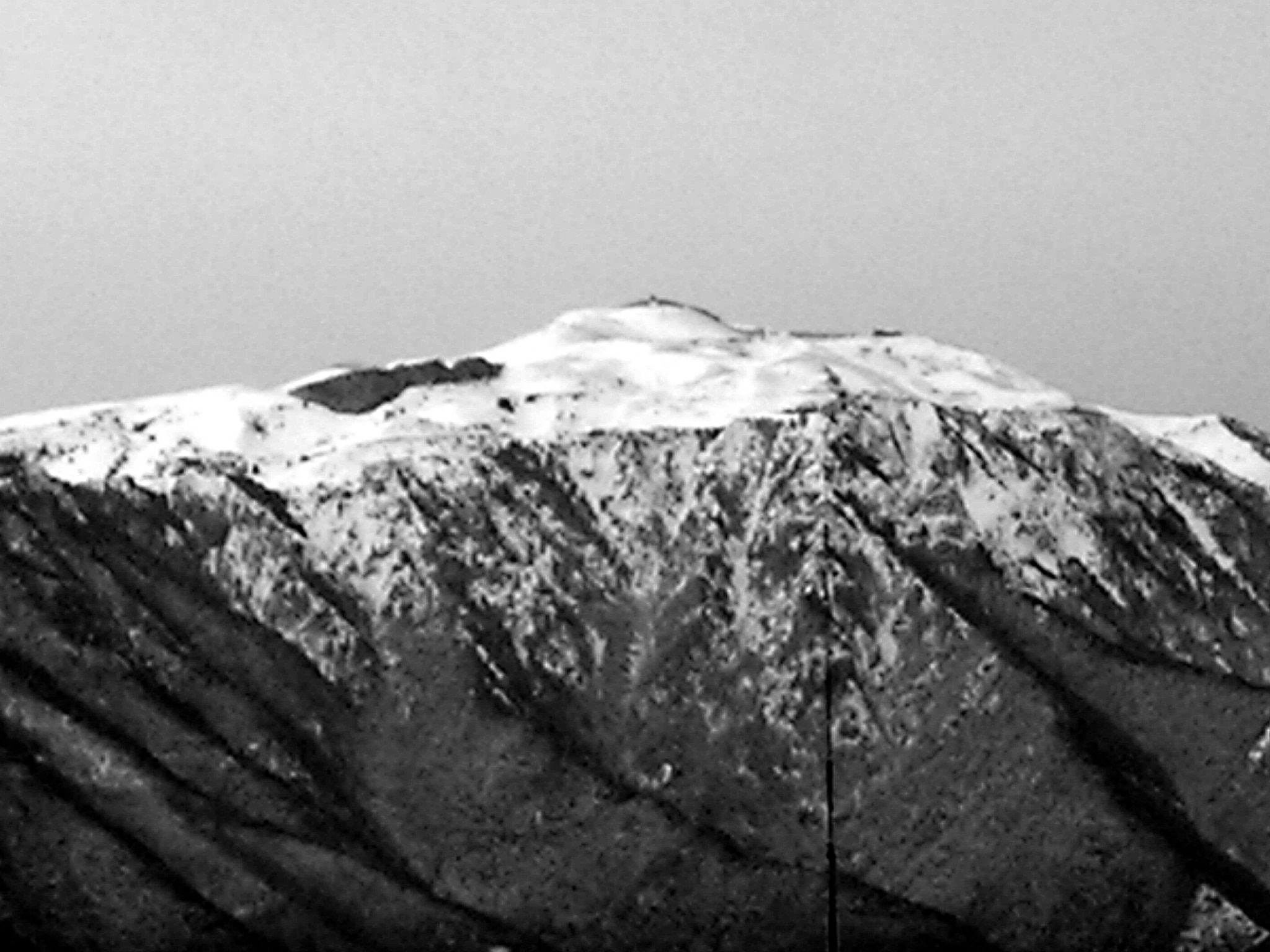 fotografia del versante sud del Monte Grappa.Foto personale.Marzo 2007